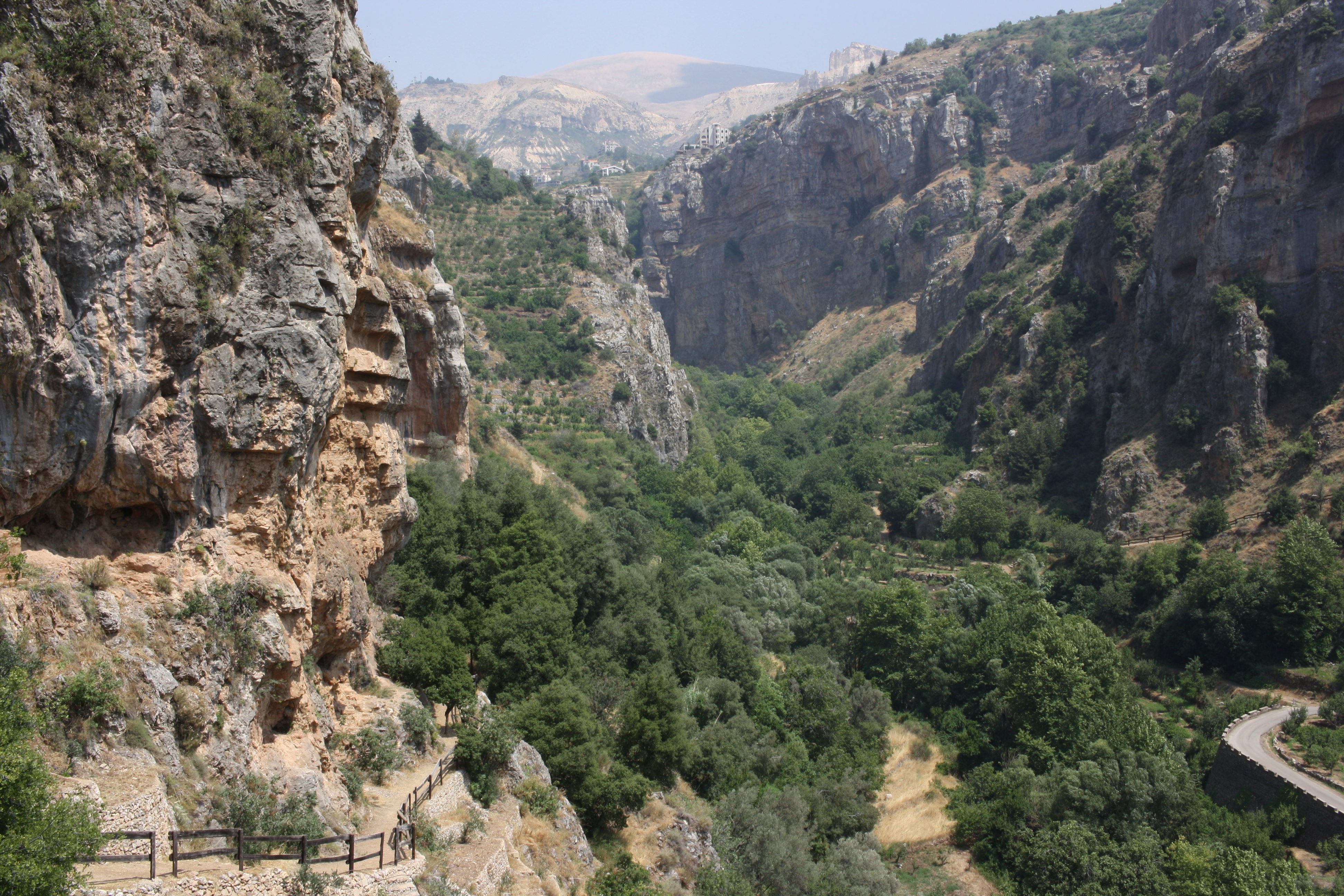 Kaddicha Vallee from Mar Licha Monastery